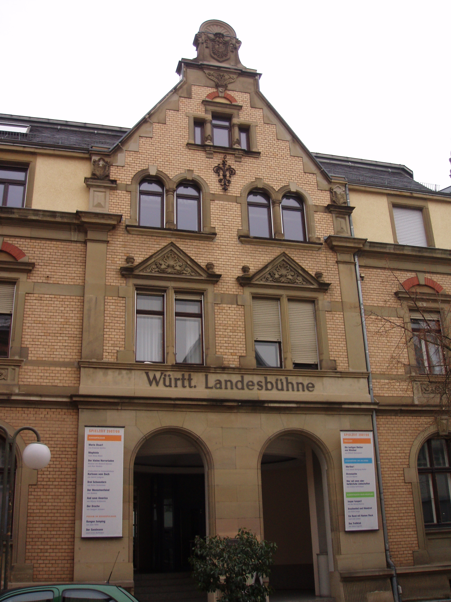 Württembergische Landesbühne Esslingen, Ritterstraße 11